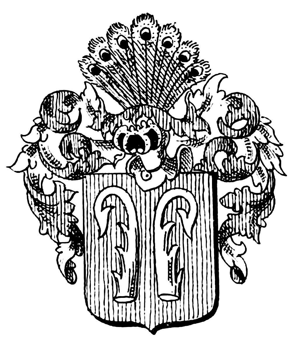 Wappen derer von Riemen